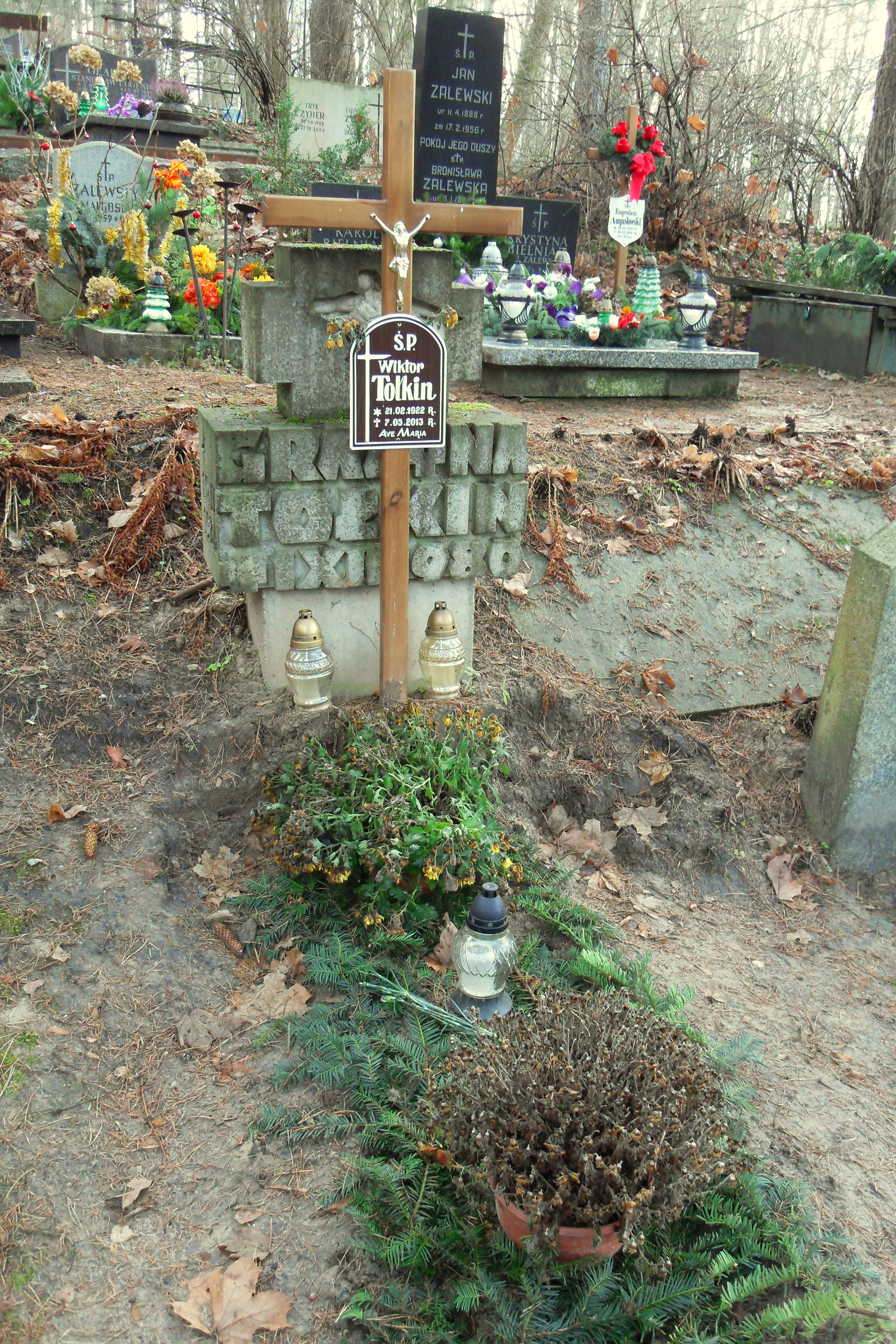 Gdańsk Wrzeszcz. Cmentarz Srebrzysko, grób Wiktora Tołkina.